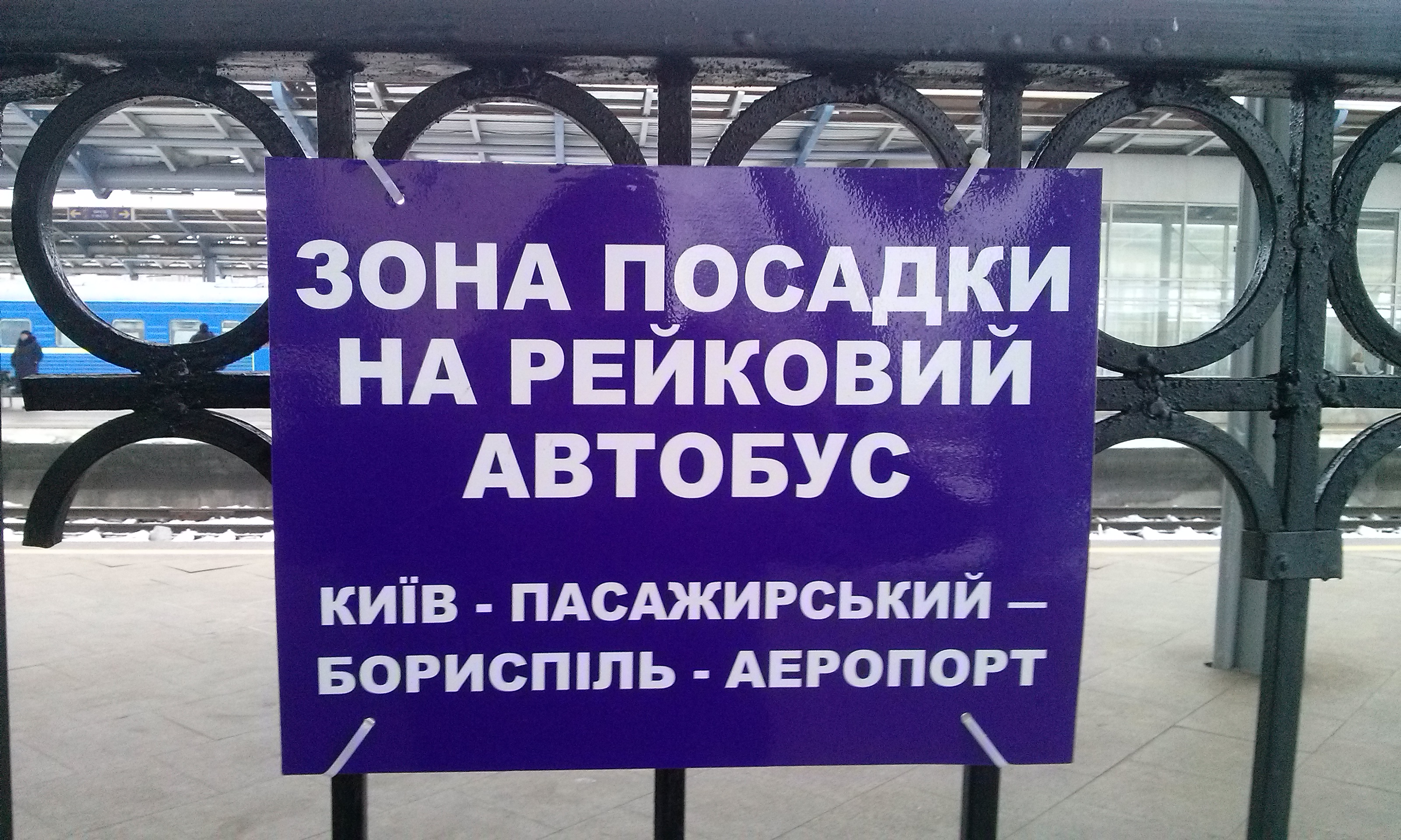 табличка на перроне зоны посадки